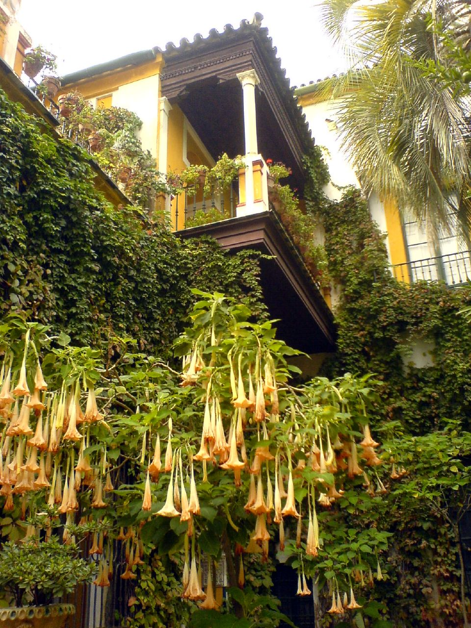 Jardín Chico de la Casa de Pilatos (Sevilla, Andalucía, España)